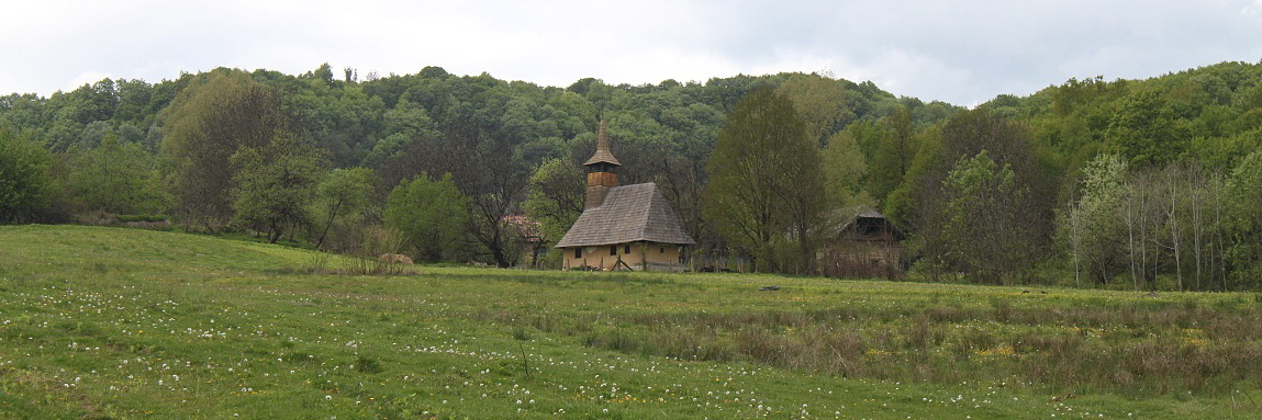 Biserica de lemn din Măleni, județul Sălaj.